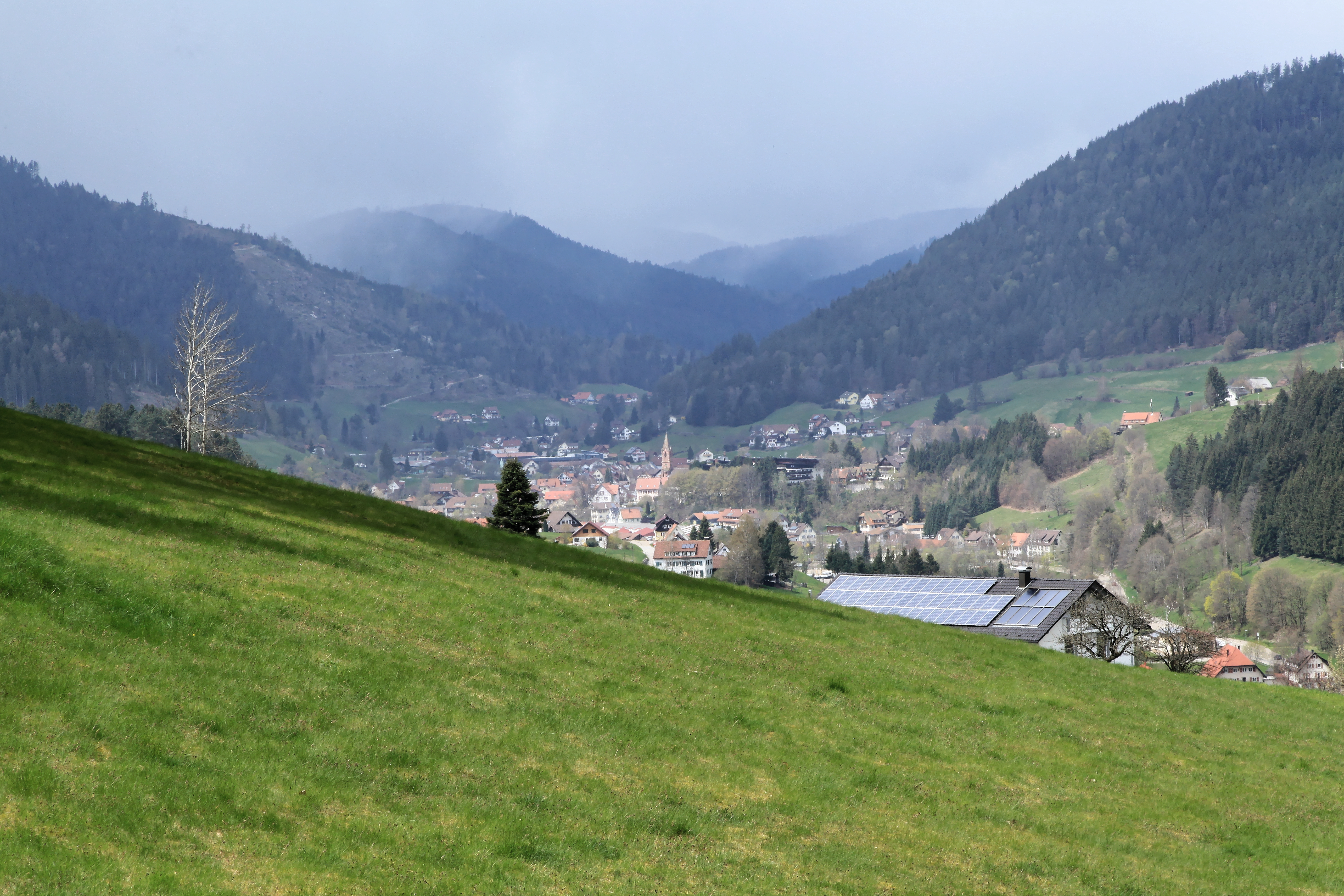 Blick vom Aussichtspunkt Allmand-Blick auf Mitteltal, Baiersbronn